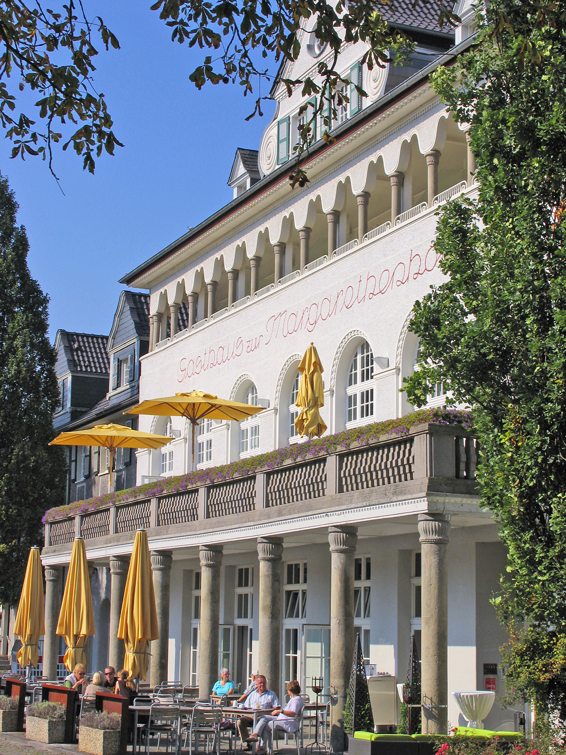 Gasthaus Margarethenhöhe am Kleinen Markt, erbaut 1912